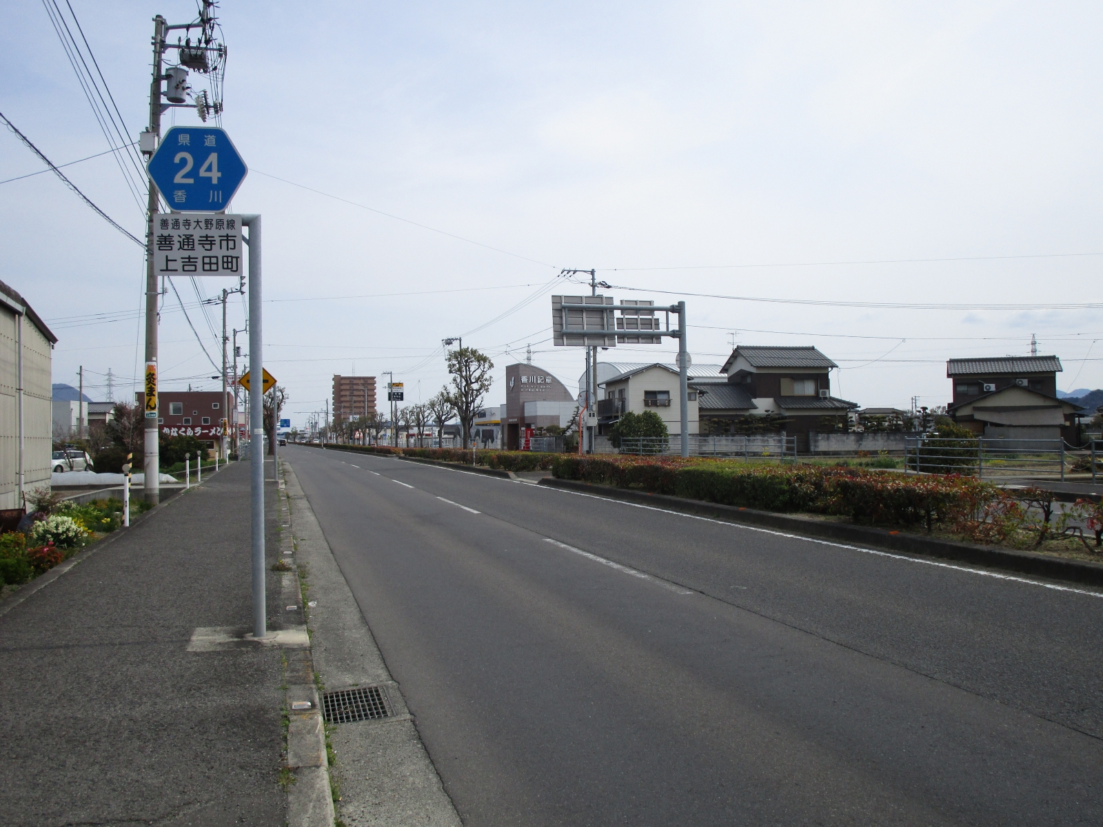 香川県道24号善通寺大野原線(香川県善通寺市上吉田町、上吉田町交差点付近より撮影）